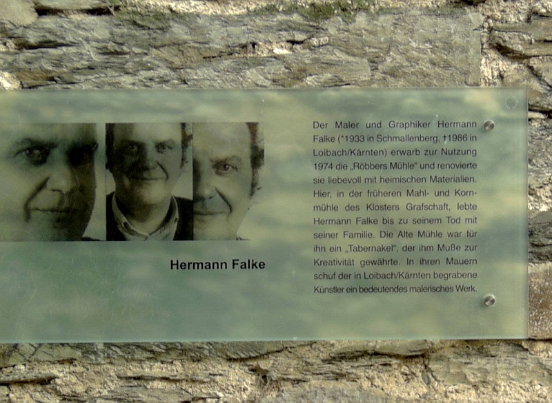 Kunsthaus Alte Mühle in Schmallenberg (Hinweistafel), Germany.